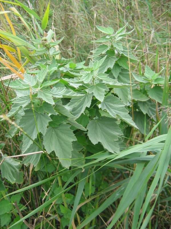 Echter Eibisch Althaea officinalis, Wismarbucht